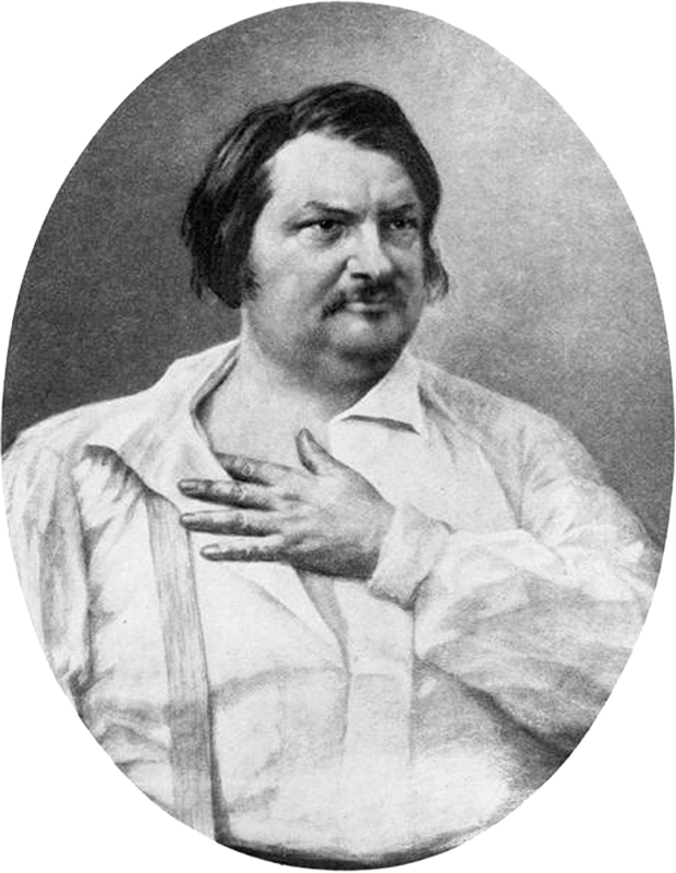 Honoré de Balzac, photographie retouchée par Nadar à partir du daguerréotype de Bisson.